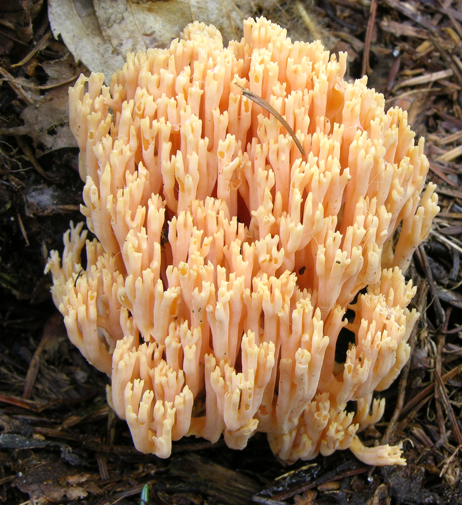 Ramaria formosa (Pers.) Quél.